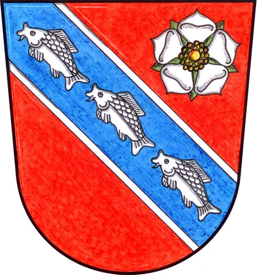 Česky: znak obce Žár